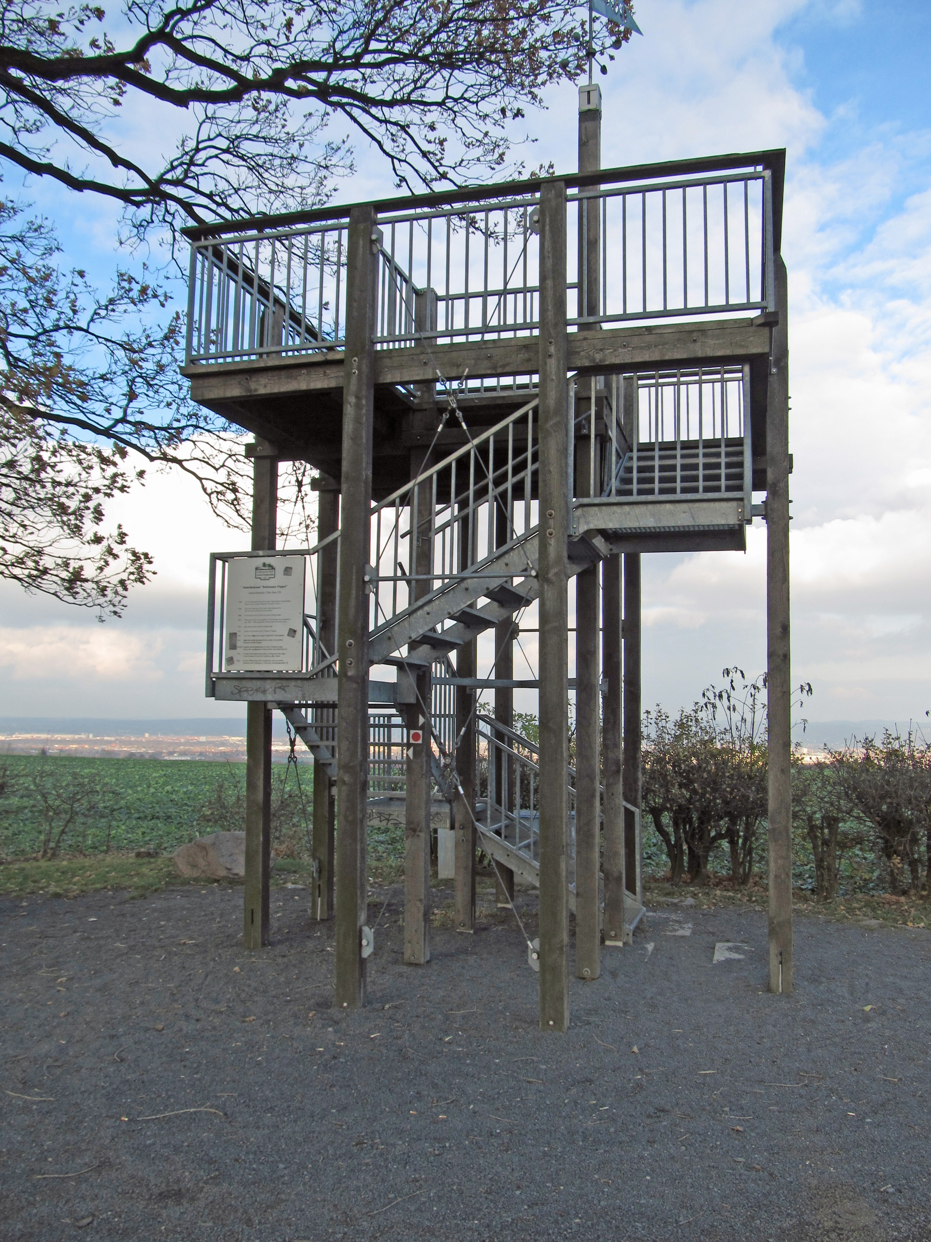 Aussichtsgerüst an der Babisnauer Pappel, Gemeinde Kreischa, Landkreis Sächsische Schweiz-Osterzgebirge